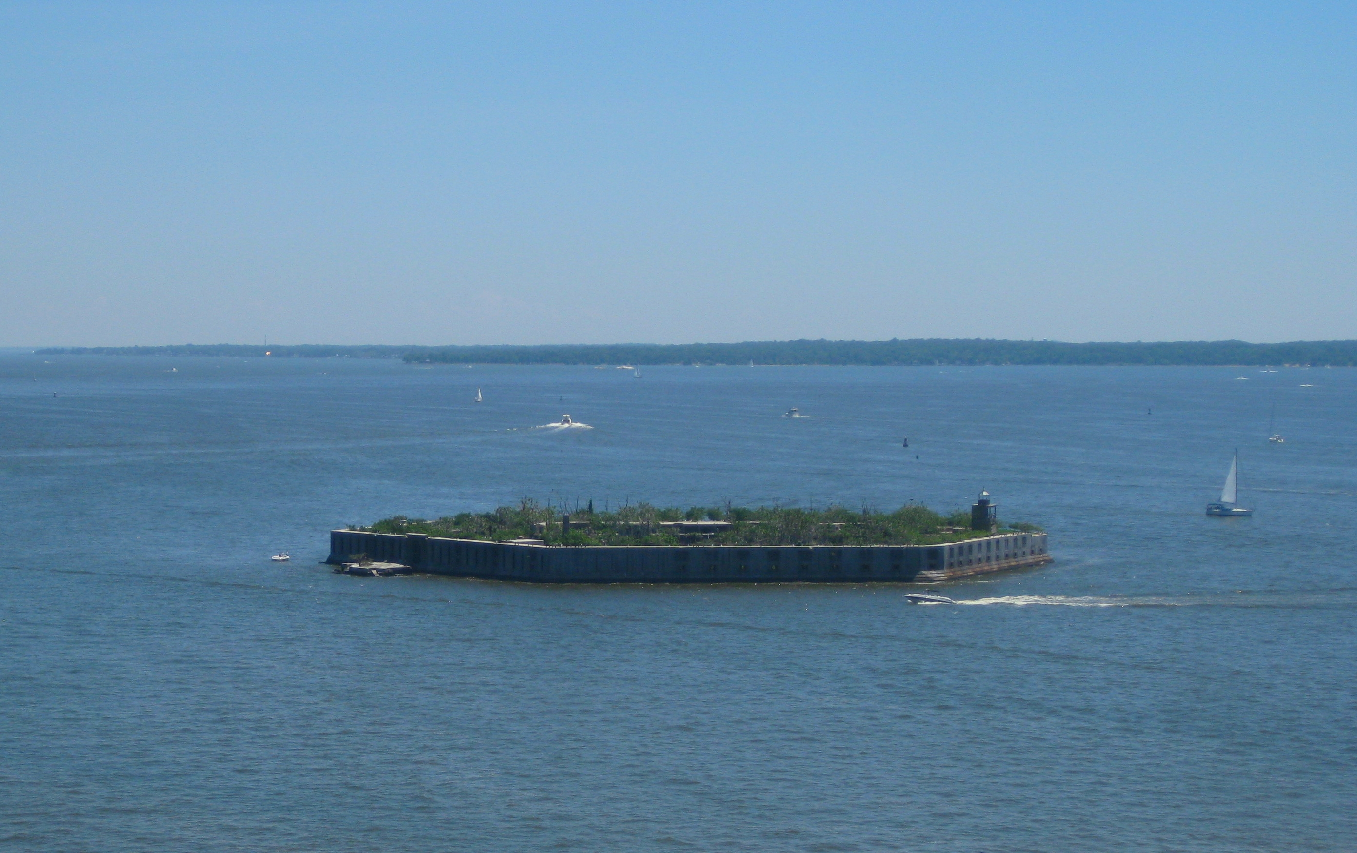 Fort Carroll, Baltimore